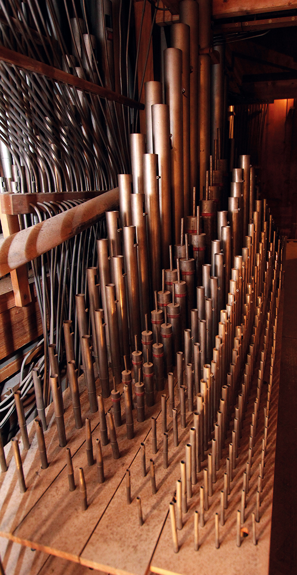 Pfeifen der unteren Windlade der Strebel-Orgel in St. Michael zu Stadtsteinach. Das Foto dokumentiert den Zustand 2017.